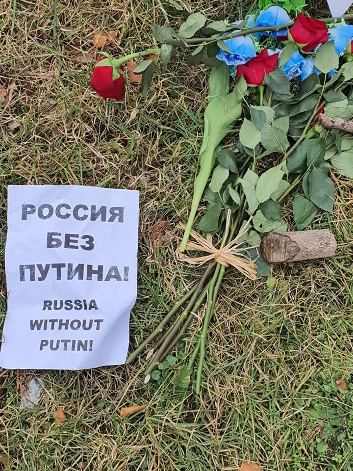 Площа Бориса Нємцова, Прага